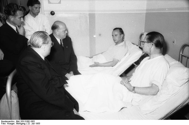 Bergwerksunglück in Niederschlema Zentralbild/Krueger,22.7.1955,Ministerpräsident Otto Grotewohl besuchte beim Bergwerksunglück in Niederschlema verletzte Bergleute. Am 22.7.1955 besuchten der Ministerpräsident Otto Grotewohl und das Mitglied des Politbüros des ZK der SED, Karl Schirdewan, im Krankenhaus in Schwarzenberg und der Sekretär des ZK der SED Gerhard Ziller im Krankenhaus in Stollberg die beim Grubenunglück in Niederschlema und bei der Rettungsaktion verletzten Bergleute. U.B.z. Ministerpräsident Otto Grotewohl und Karl Schirdewan im Gespräch mit verletzten Bergleuten. Rechts: Wettersteiger Friedrich Bruseberg und (daneben) der Stellvertretende Reviersteiger Helmut Tischendorf, beide vom Schacht 66. Abgebildete Personen: Grotewohl, Otto: Ministerpräsident, stellvertretender Staatsratsvorsitzender, DDR Schirdewan, Karl: Volkskammerabgeordnete, Politbüro des ZK der SED, DDR (GND 120487098) Information added by Wikimedia users.